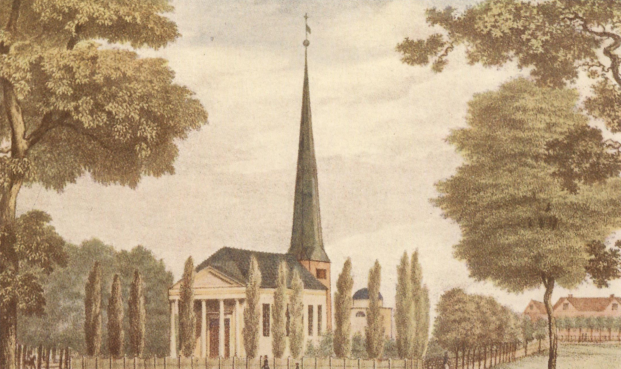 Zweite Wandsbeker Kirche mit Schimmelmann-Mausoleum 1800-1898 von J.C.C.Meyn